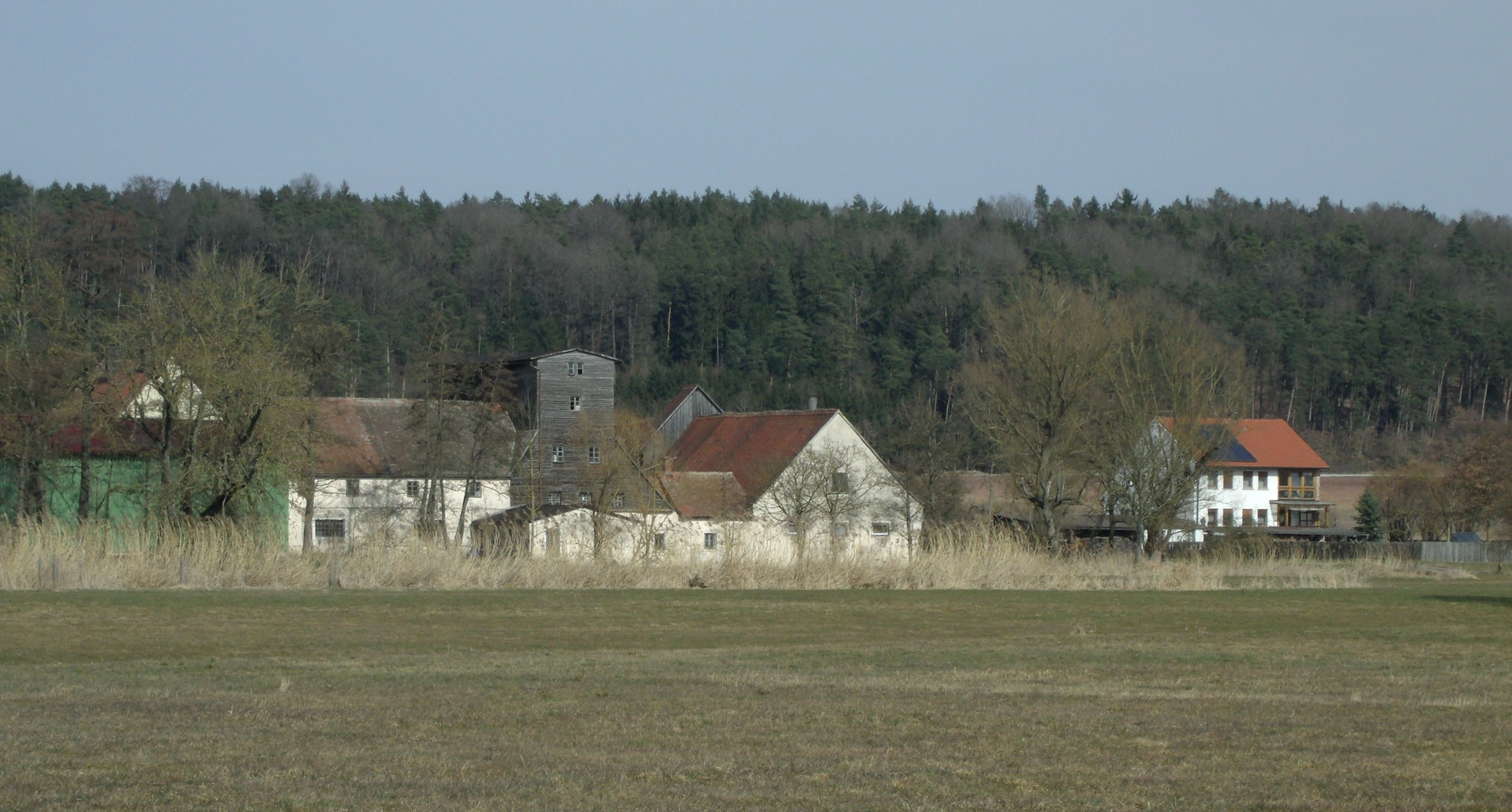 Rauenbuch, Ortsteil der Stadt Leutershausen im mittelfränkischen Landkreis Ansbach